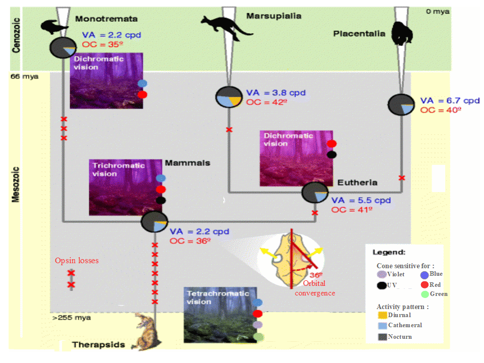 Évolution de la vision des couleurs chez les mammifères. Légende : OC (orbit convergence, convergence orbitale, en °), VA (visual acuity, acuité visuelle, en cycles par degré). Derived from Rui Borges, Warren E. Johnson, Stephen J. O’Brien, Cidália Gomes, Christopher P. Heesy and Agostinho Antunes, Adaptive genomic evolution of opsins reveals that early mammals flourished in nocturnal environments, BMC Genomics, 2018 19:121